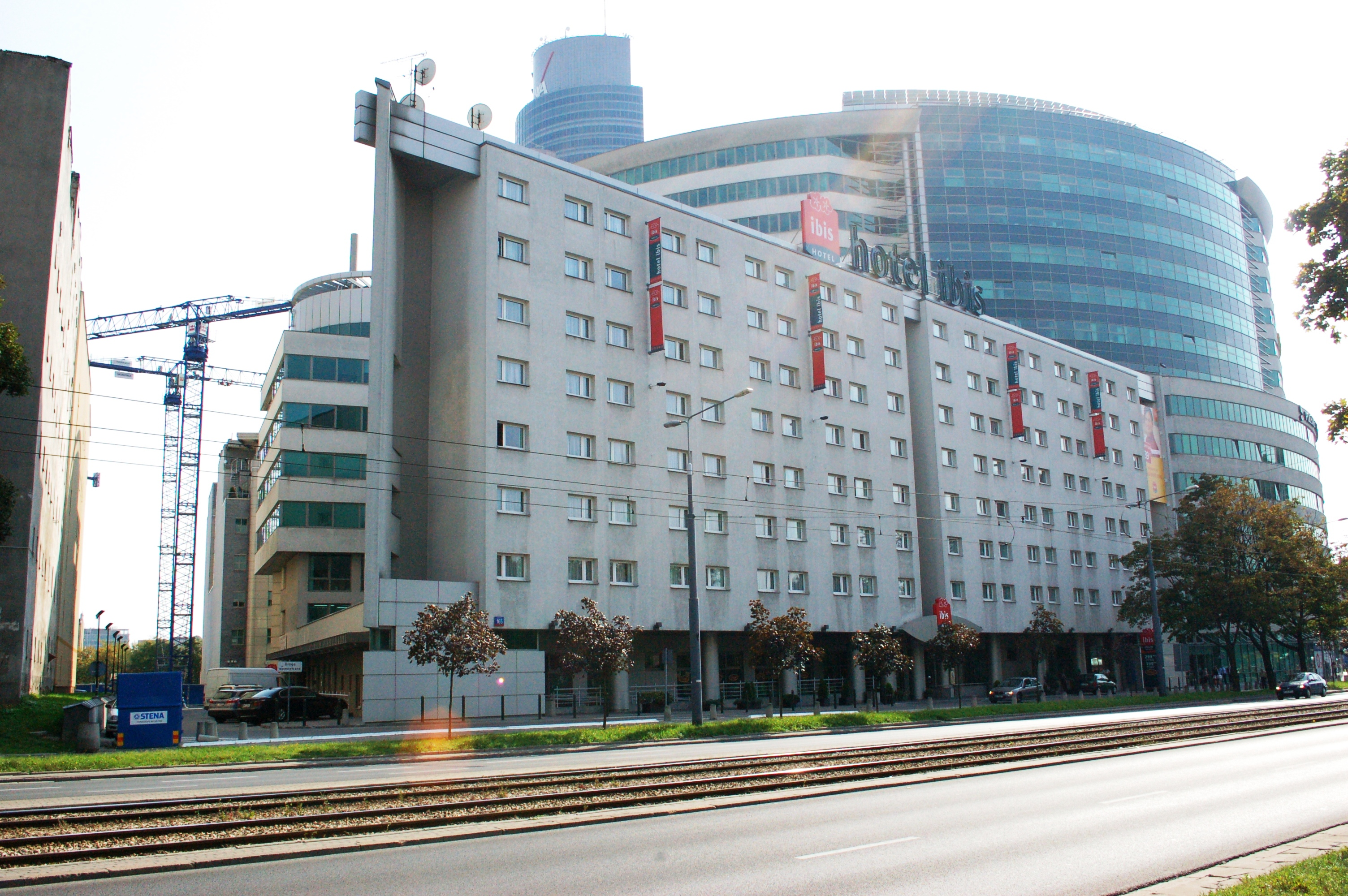 Ibis Hotel Centrum, Warschau